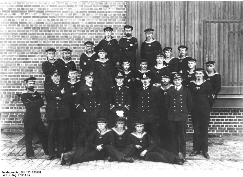 Besatzung des U-Bootes U 9 I. Weltkrieg 1914-1918 Seekrieg 1914: Vom U-Boot "U 9" der kaiserlichen deutschen Kriegsmarine wurde am 22.9.1914 drei britische Panzerkreuzer in der Nordsee versenkt und am 14. Oktober ein britischer Kleiner Kreuzer. Die Besatzung von "U 9": v.l. liegend Maschinistenmaat Mertz, Bootsmannsmaat Heer, Maschinistenmaat Reichardt. 1. Reihe: Matrose Stellmacher, Obersteuermann Traebert, Oberheizer Schuschke. Erster Offizier Spiess, Kapitänleutnant Otto Weddigen (Kommandant) Marineingenieur Schön, Bootsmannsmaat Schoppe, Obermaschinist Heinemann, Oberheizer Eisenblätter. 2. Reihe: Matrose Geist, Heizer Schober, Funkenheizer Sievers, Matrose Schenker, Obermaschinenanwärter Wollenberg, Heizer Vollstedt, Heizer Karbe, Matrose Rosemann, Obermaschinenmaat Hinrichs, Heizer Köster, Heizer Lied. 3. Reihe: Matrose Schulz, Obermaschinenmaat Marlow, Obermaschinistenanwärter v. Koslowski. Abgebildete Personen: Weddigen, Otto: Kapitänleutnant, kaiserliche Marine, Kommandant des U-Bootes U 9, Deutschland